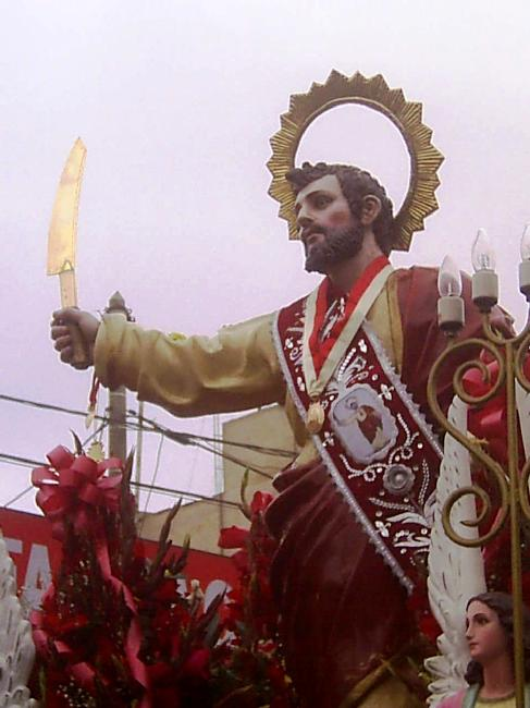 procesion de san bartolome de huacho